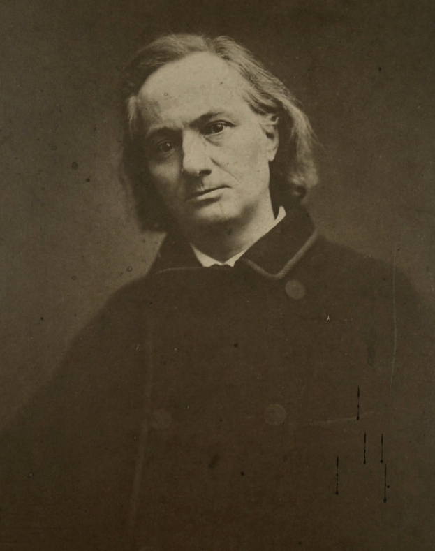 Charles Baudelaire en 1865, dernière photo avant sa mort. Photographie par Étienne Carjat. Original 24,6 x19,2 cm (cette version légèrement recadrée). Unique exemplaire connu sur trois tirages répertoriés. Collection Darzens, exposée à la BnF, exposition Charles Baudelaire, prêtée par André Jammes. Le portrait est reproduit en illlustration de la notice nécrologique du Monde illustré, 7 septembre 1867 et dans le numéro de La Plume du 15 mai 1903. Vente Binoche et Giquello, Drouot Paris, 10 novembre 2016. Lot N°120.